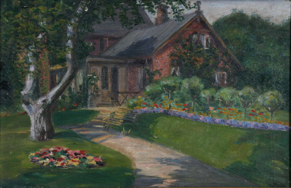 "Landhaus in Zeeland", Öl auf Leinwand, 1905. 35 x 53 cm